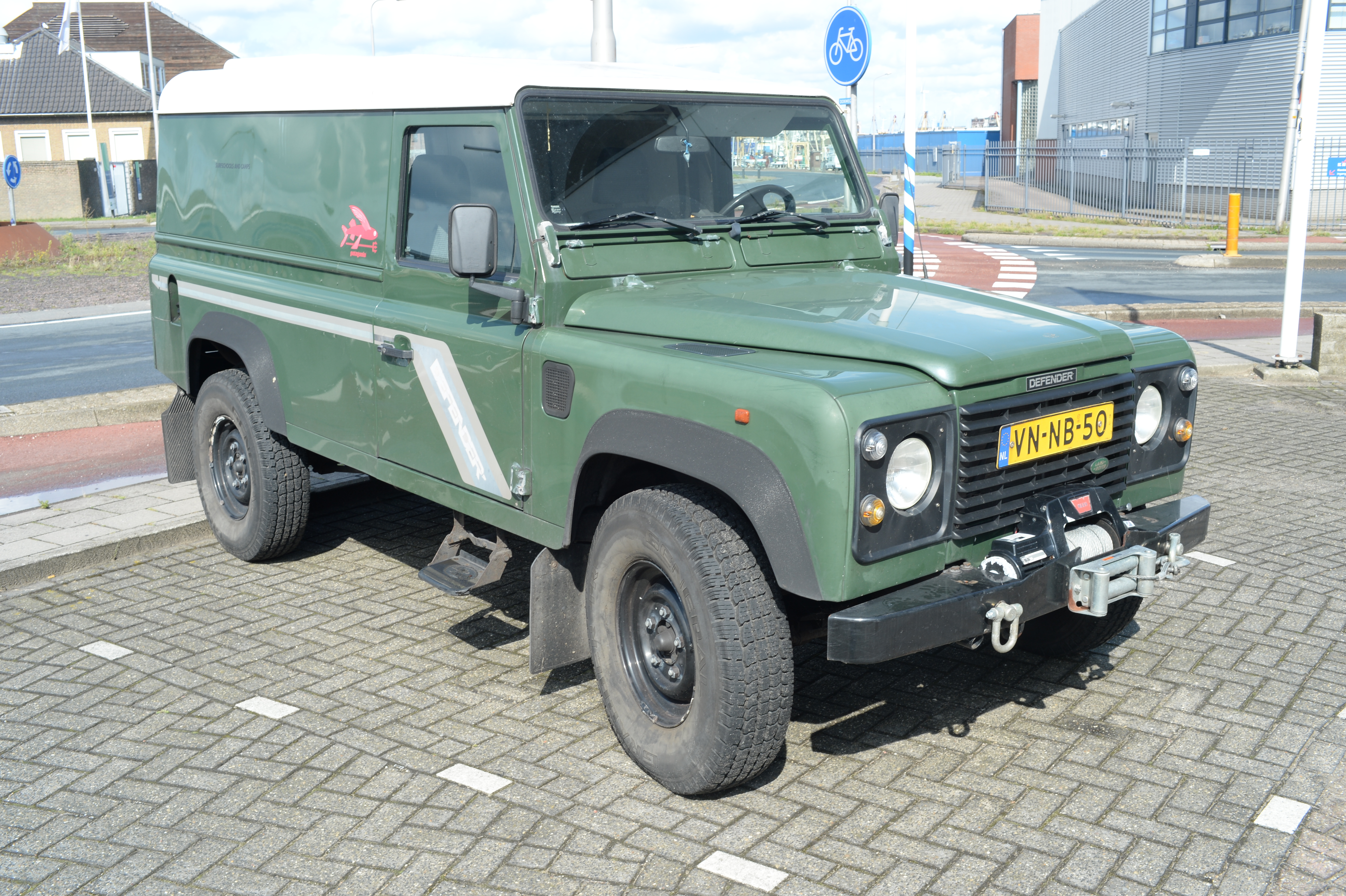 1996 Land Rover Defender 110 Hard Top HR